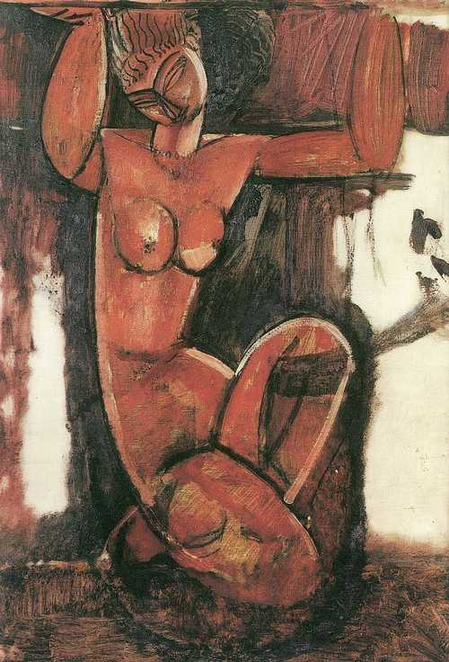 Kyratide